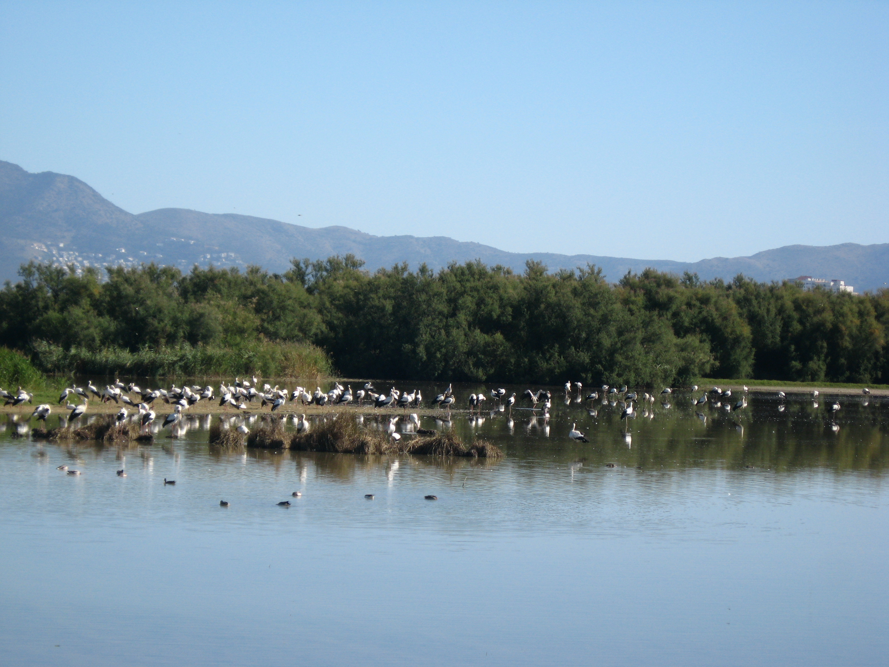 Störche und Wasservögel im Naturpark Aiguamolls (Spanien/Katalonien) Datum: 15.09.2010 Urheber: Michael Pfeiffer Quelle: privates Fotorchiv des Urhebers